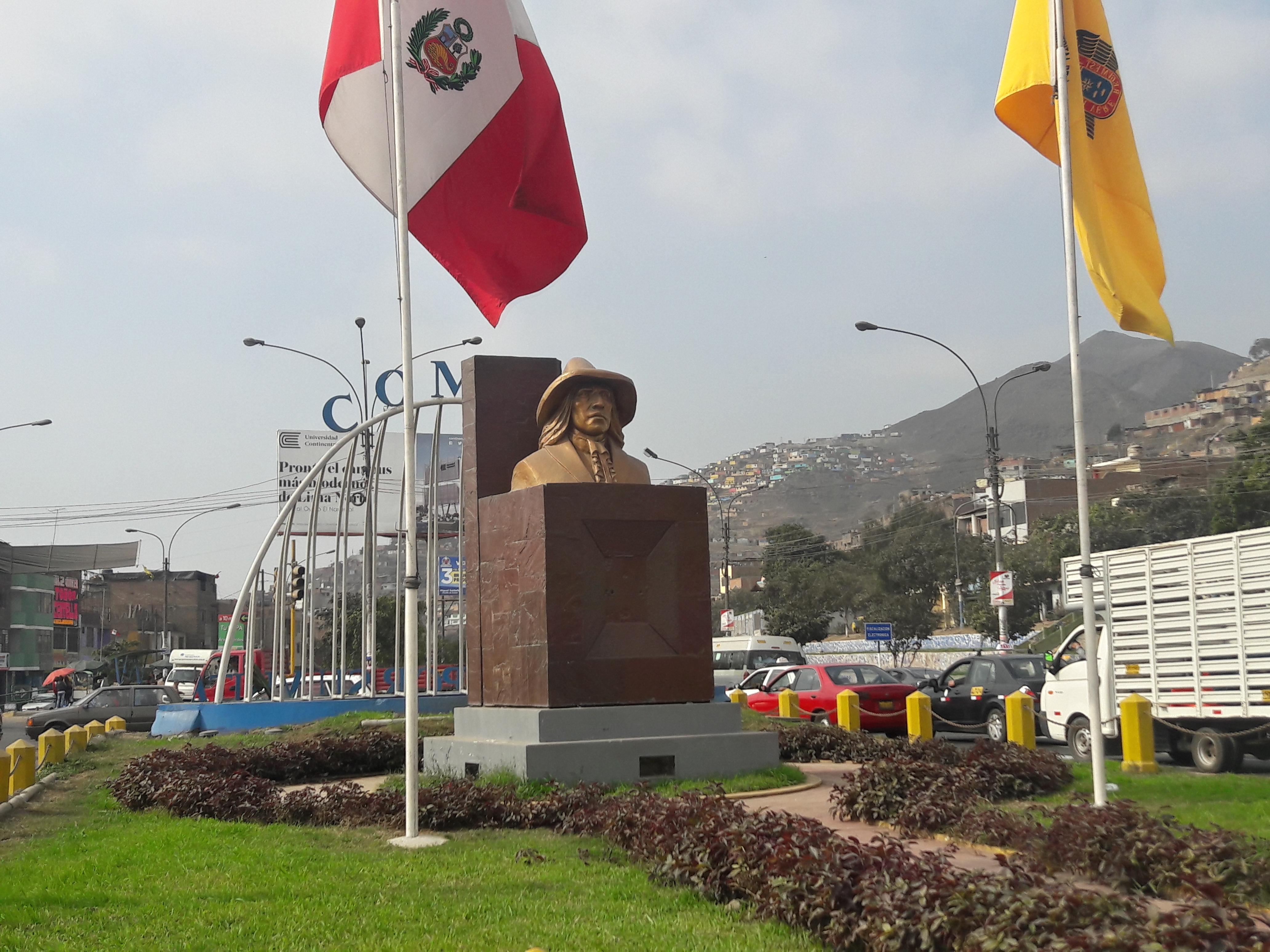 Monumento Tupac Amaru II ubica en la avenida tupac amaru II, frontera con comas y independencia